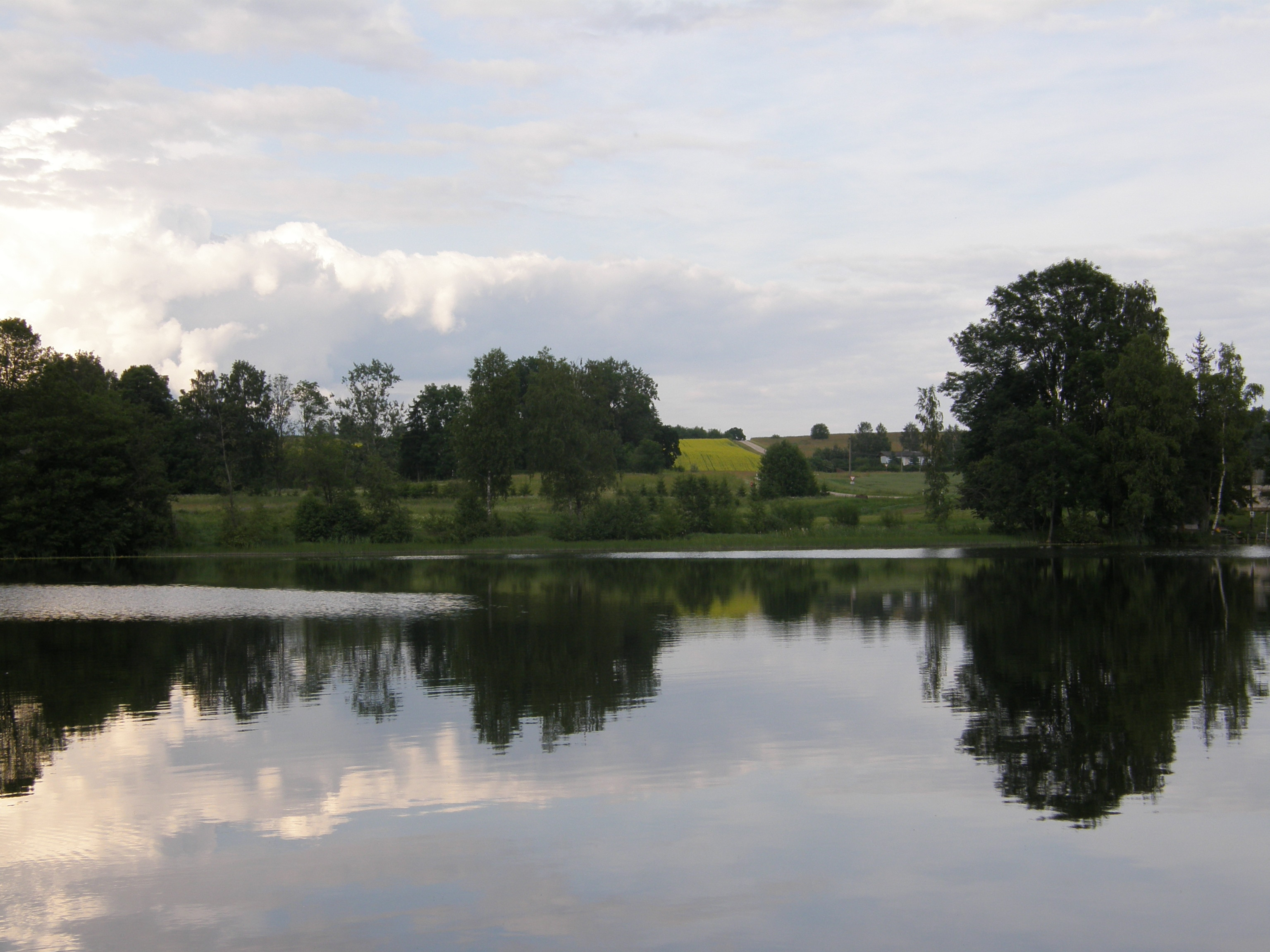 Pangodi järv.